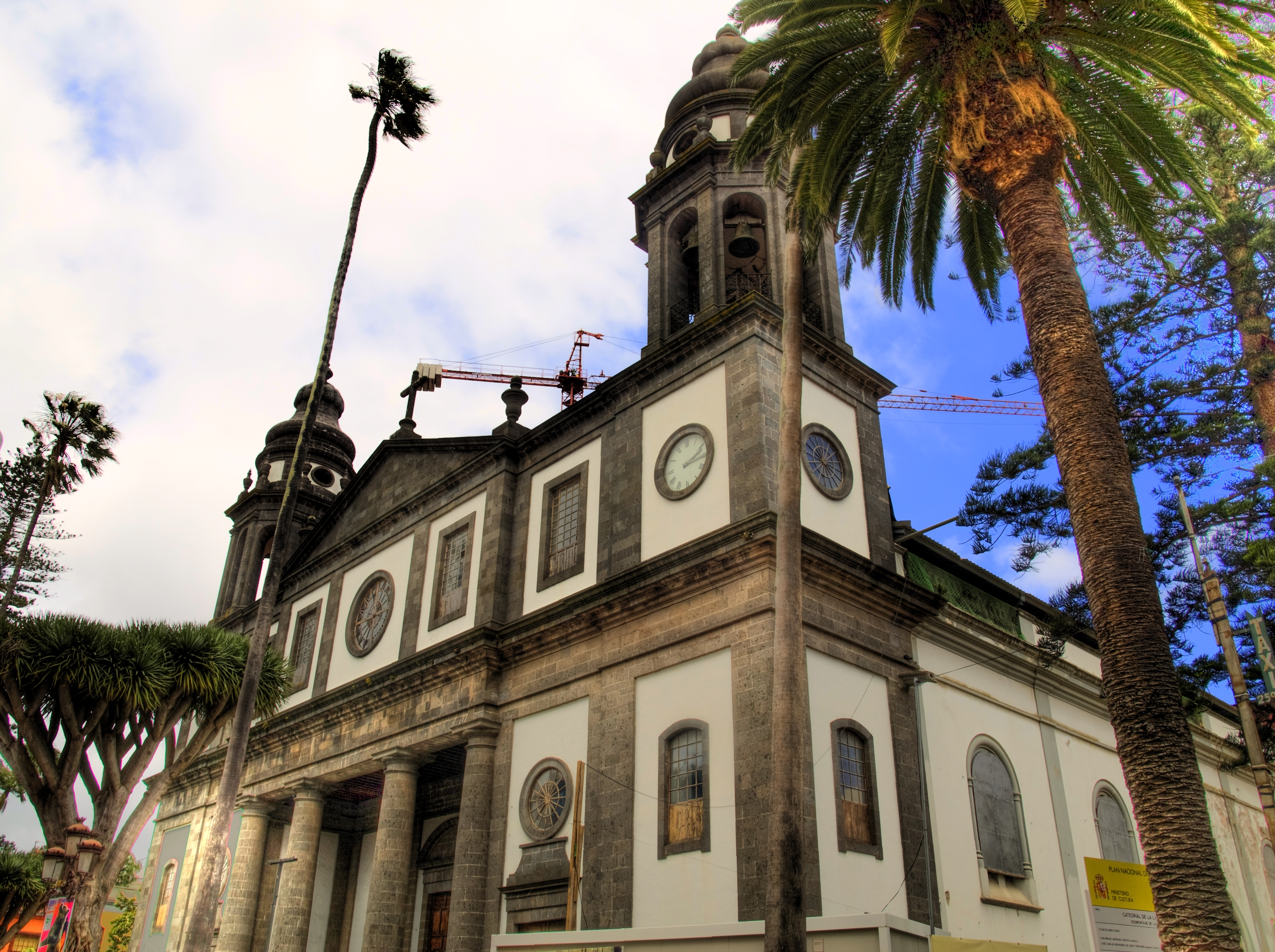 Tenerife_26